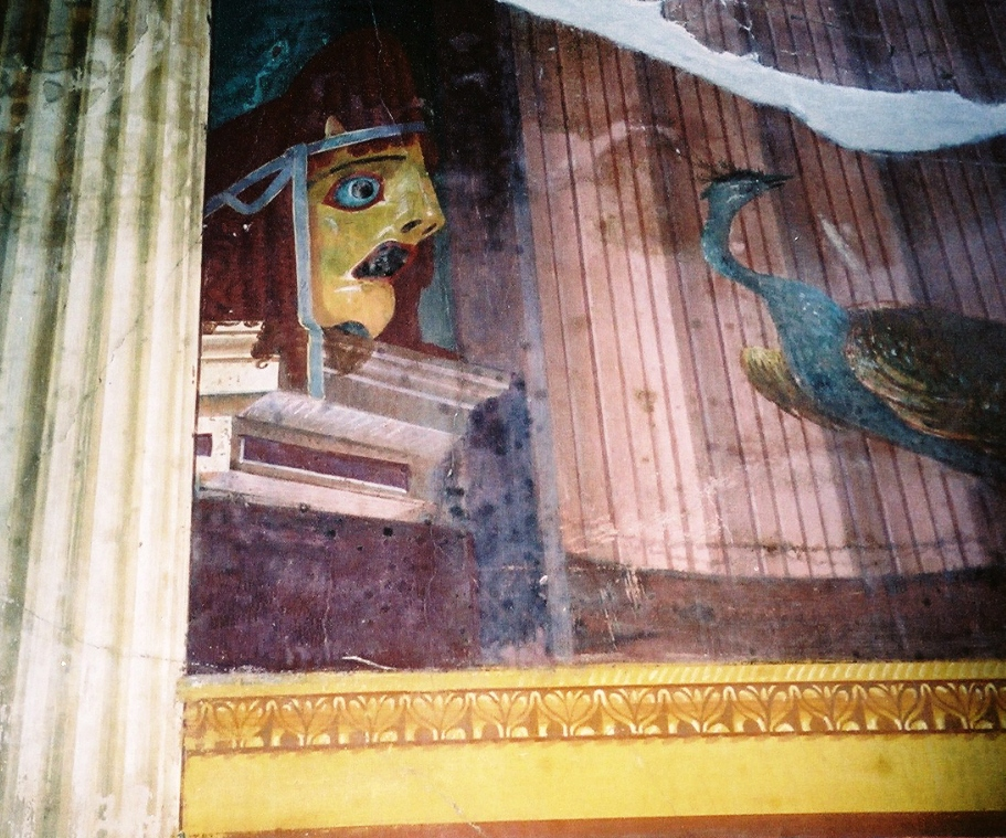 Détail d'une fresque de la villa de Poppée à Oplontis (Italie).